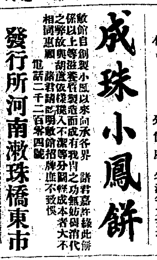 粵語: 成珠小凤饼 广告